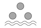 Tchintamani, a central asian decorative motive.